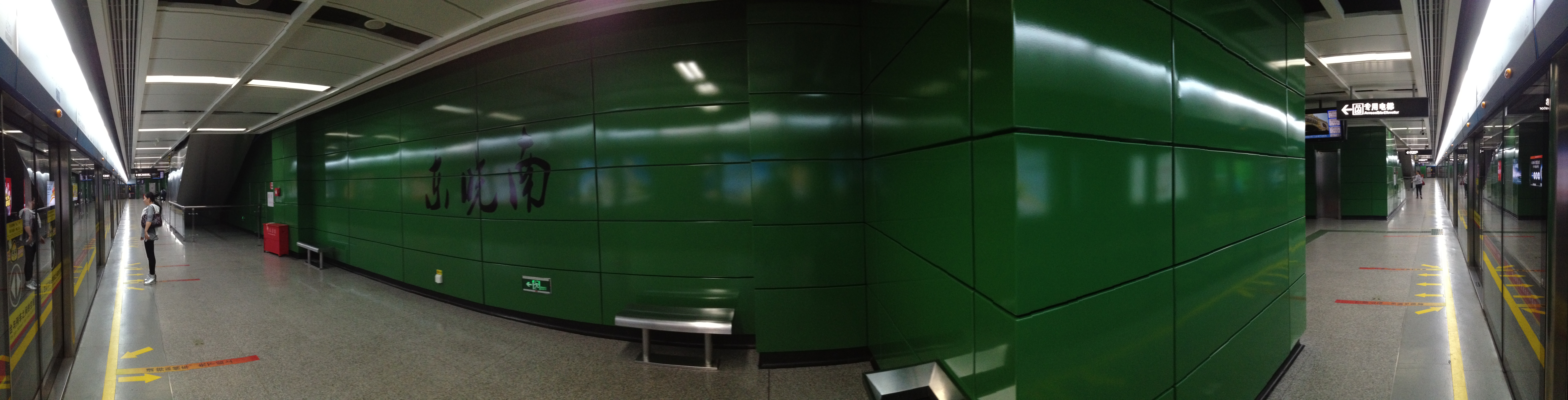 广州地铁东晓南站月台全景图